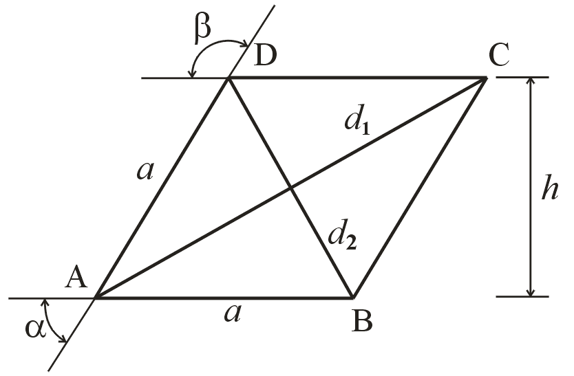 Author: Michael Angelkovich